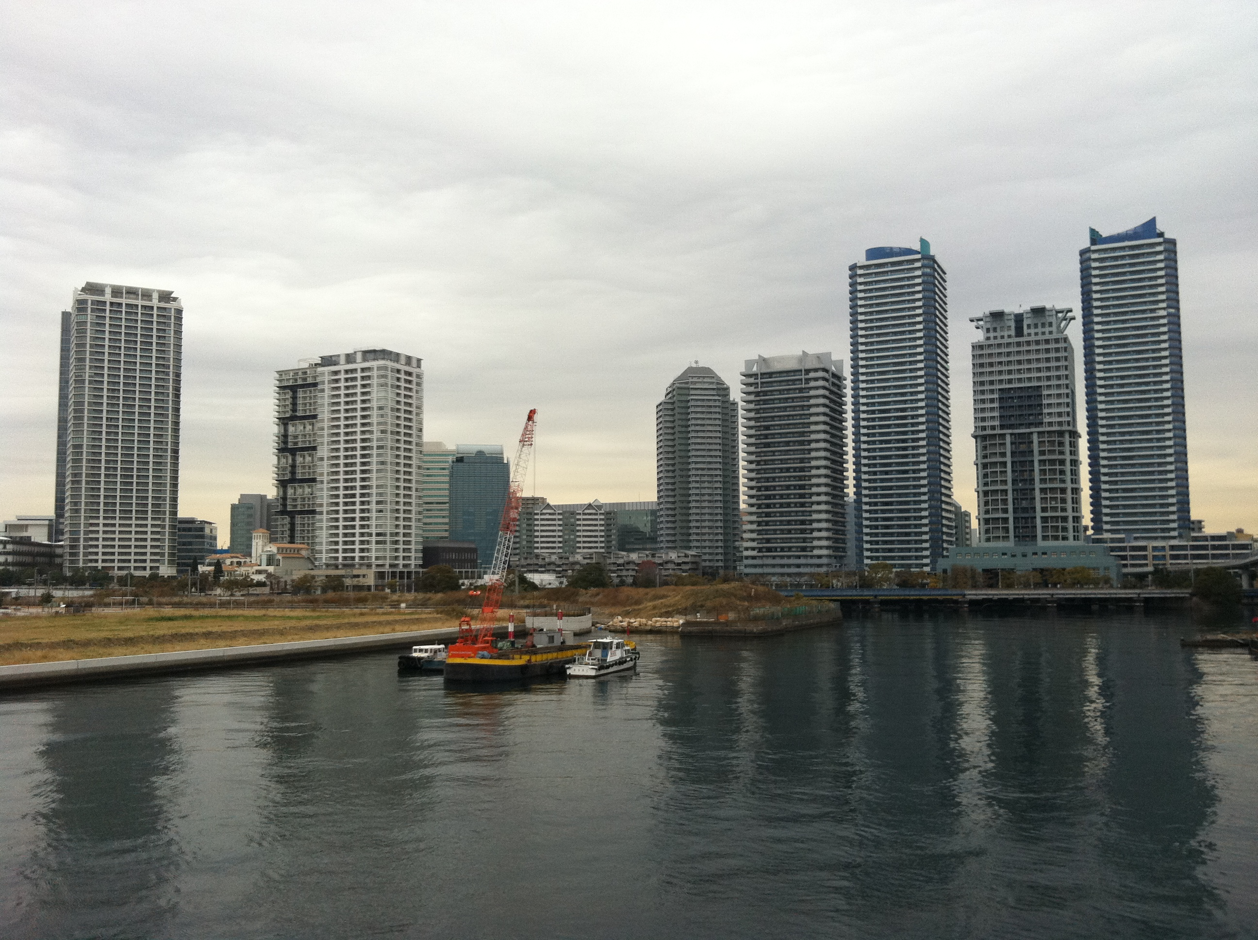 みなとみらい橋よりポートサイド地区を望む。